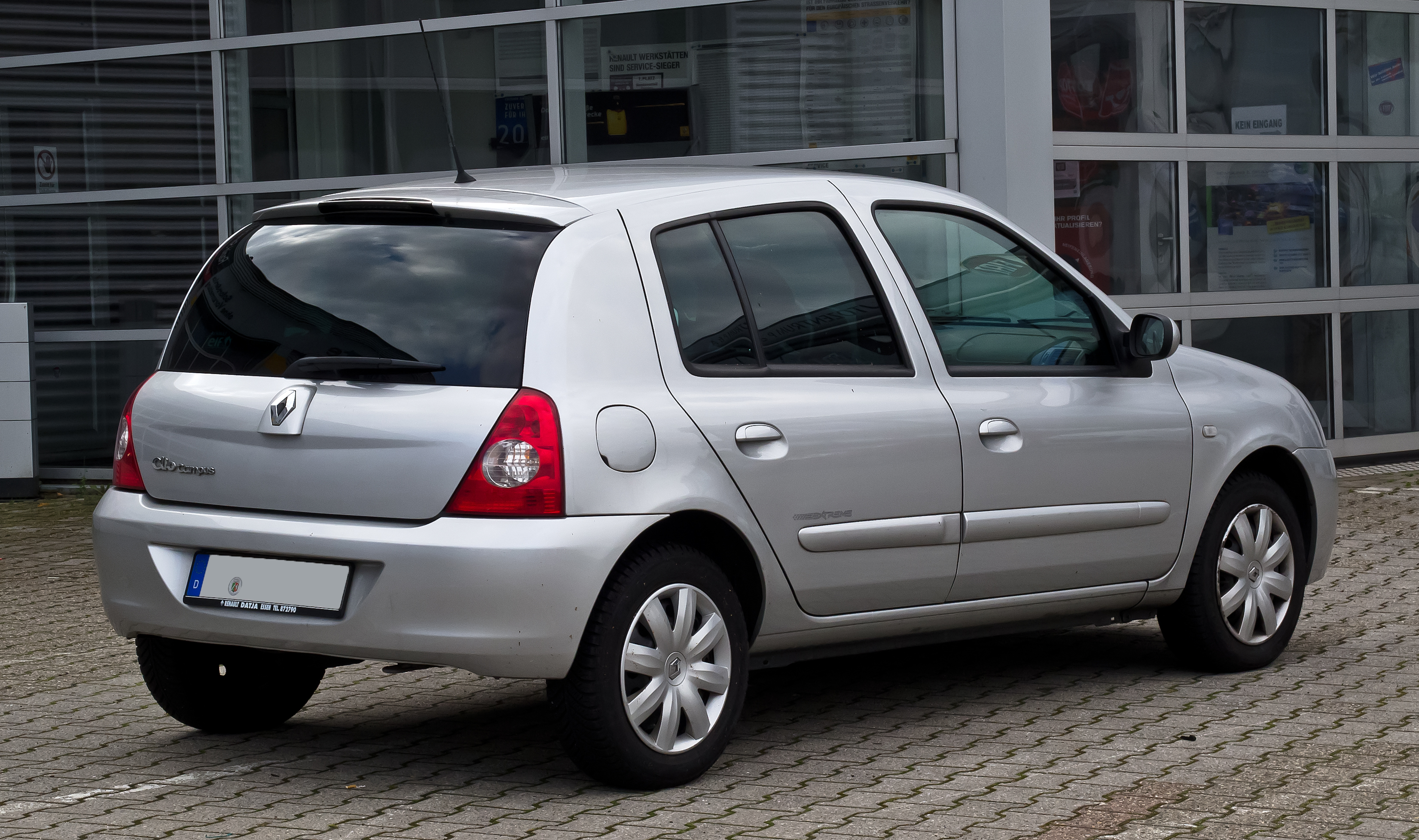 Renault Clio Campus Extreme (II, 3. Facelift)